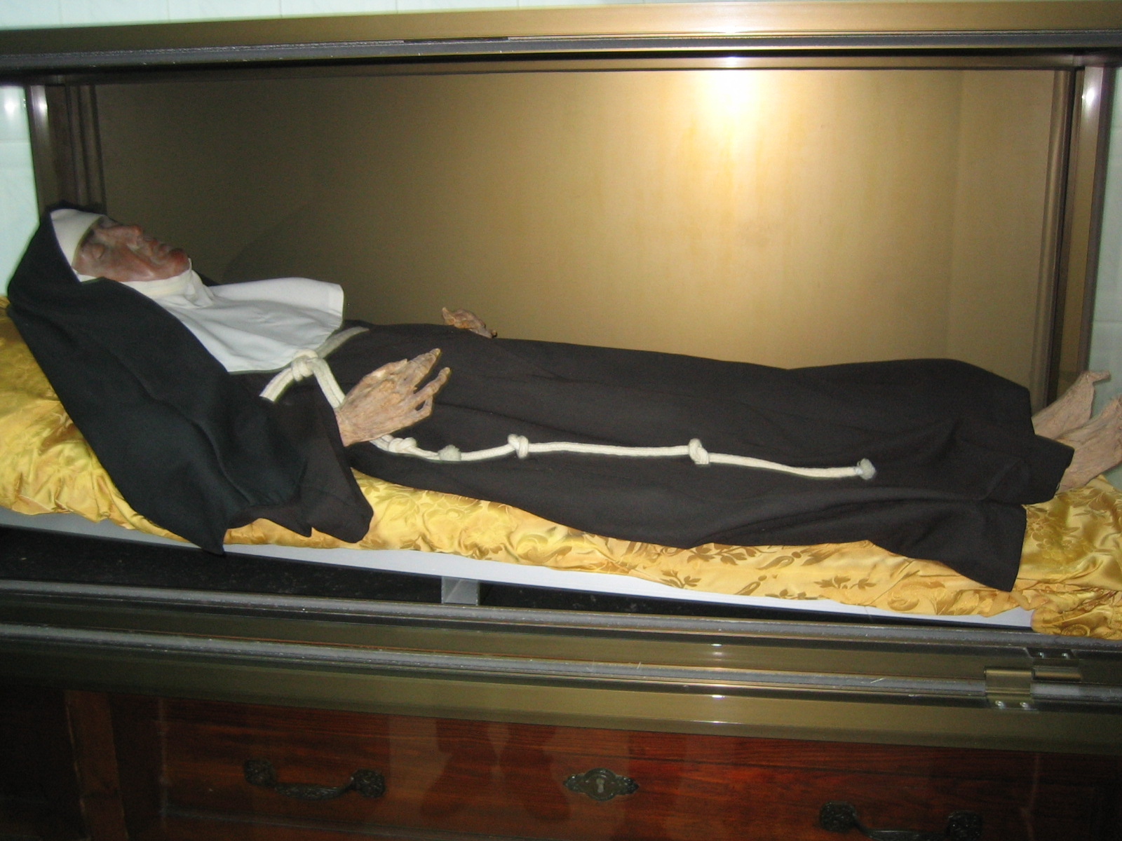 Sor ürsula Micaela en la urna de cristal en el monasterio de RR Capuchinas de Alicante